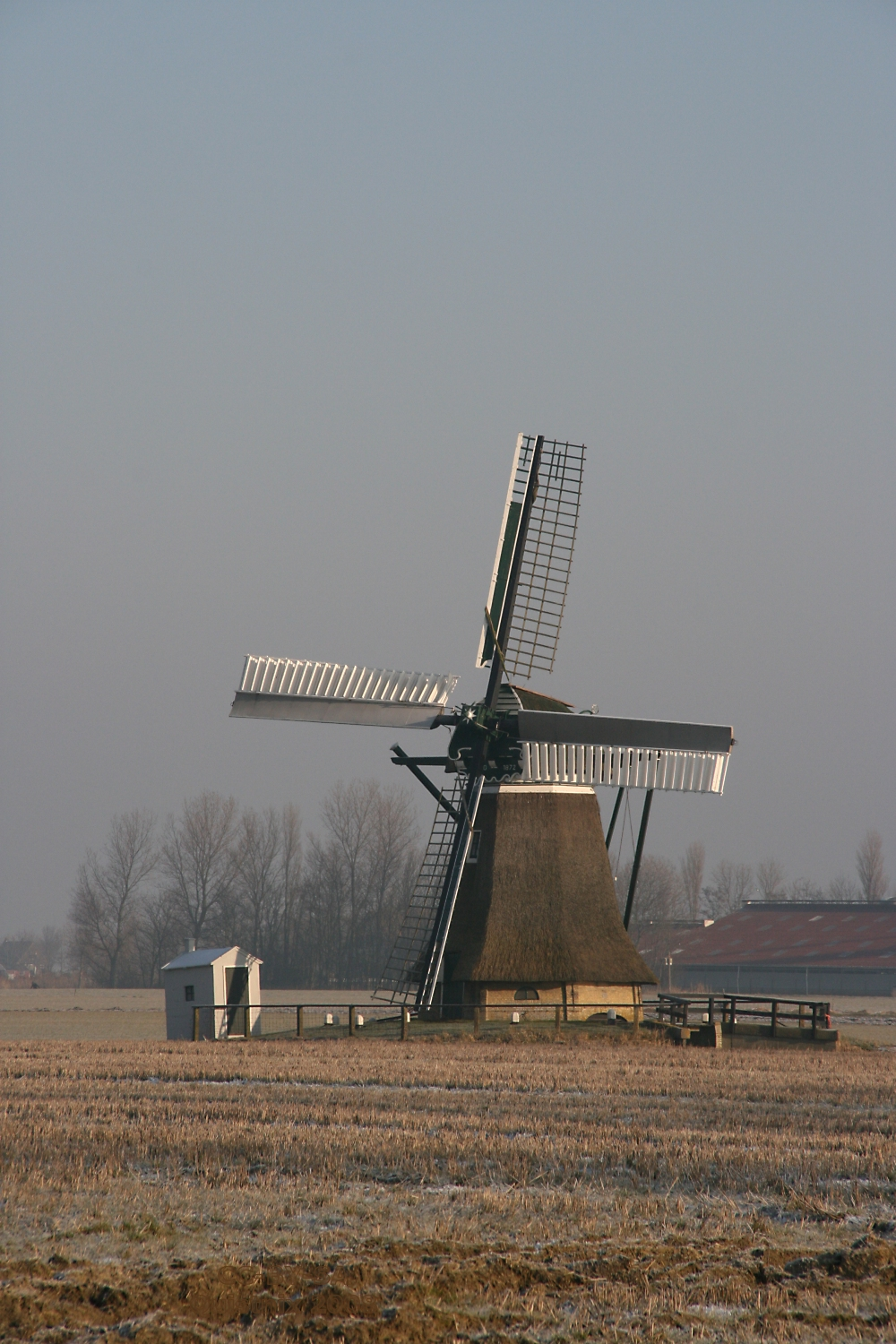 Kimswerd: molen De Eendracht